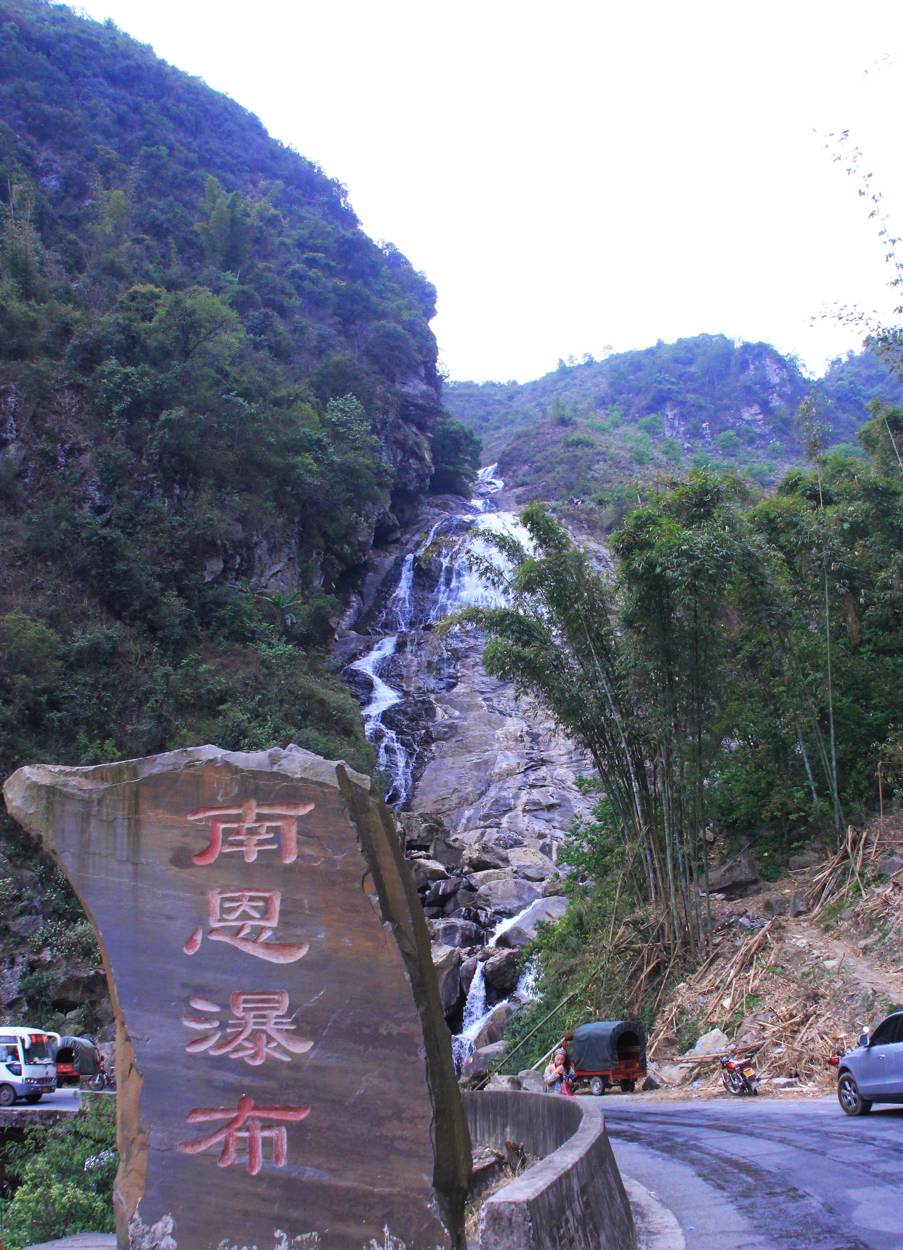 中国云南新平境内的南恩瀑布。